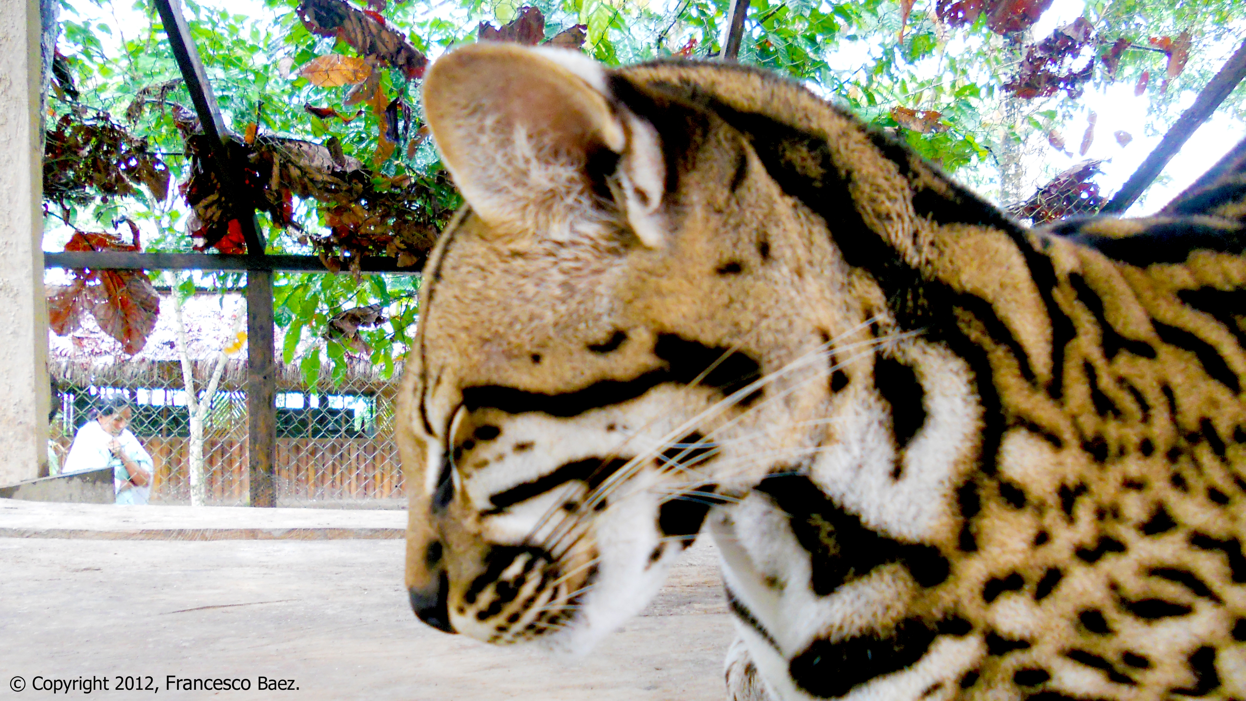 Tigrillo